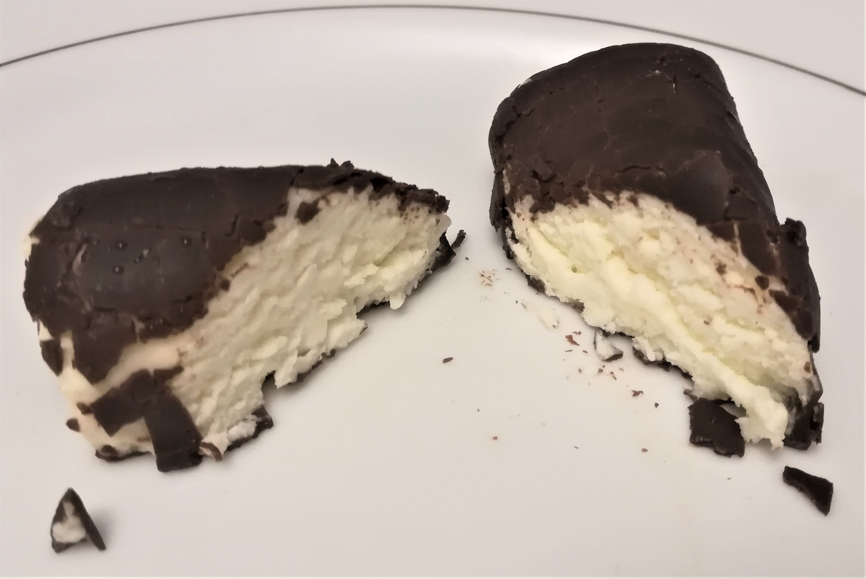 Kohuke (twarożek w czekoladzie) - Poznań.